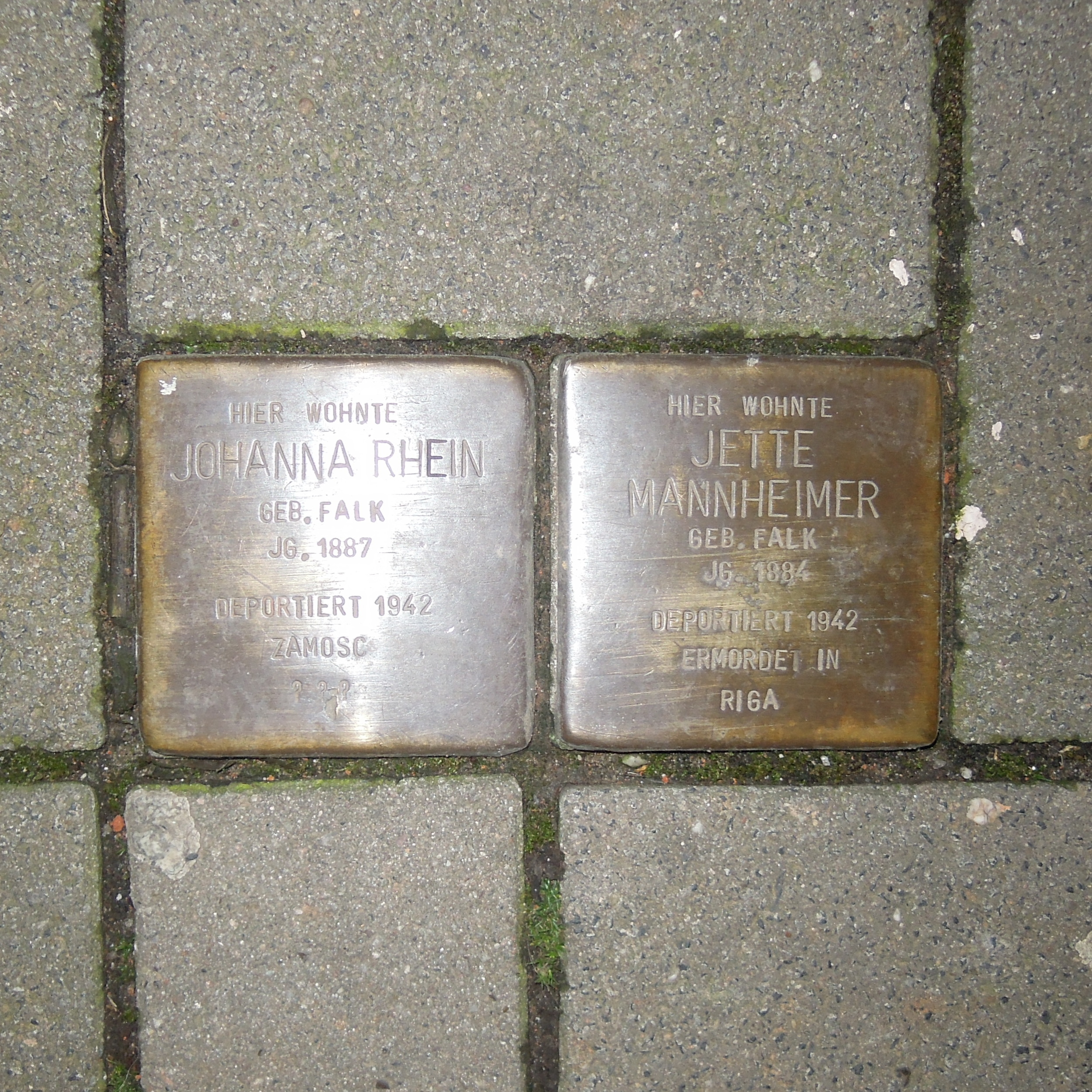 Stolpersteine Dortmund Braunschweigerstraße 23